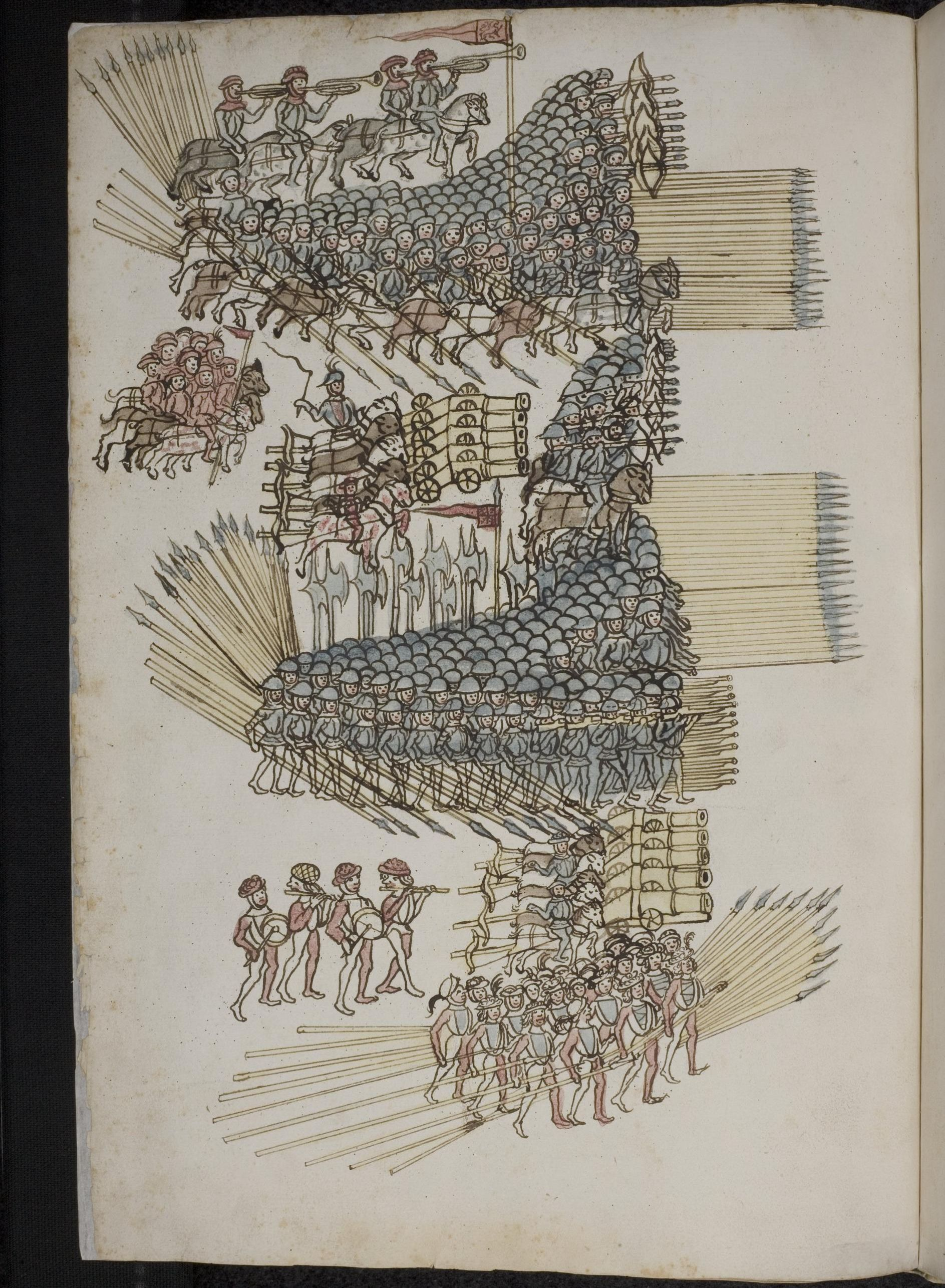 Kriegsbuch Dys büch der stryt vnd bůchßen Ward gemacht in der Vaßnacht als man zalt von cristus geburt 1496 [11.-16. Februar 1496] jar dar uff soellen die buchßenmeister haben groß acht fer war